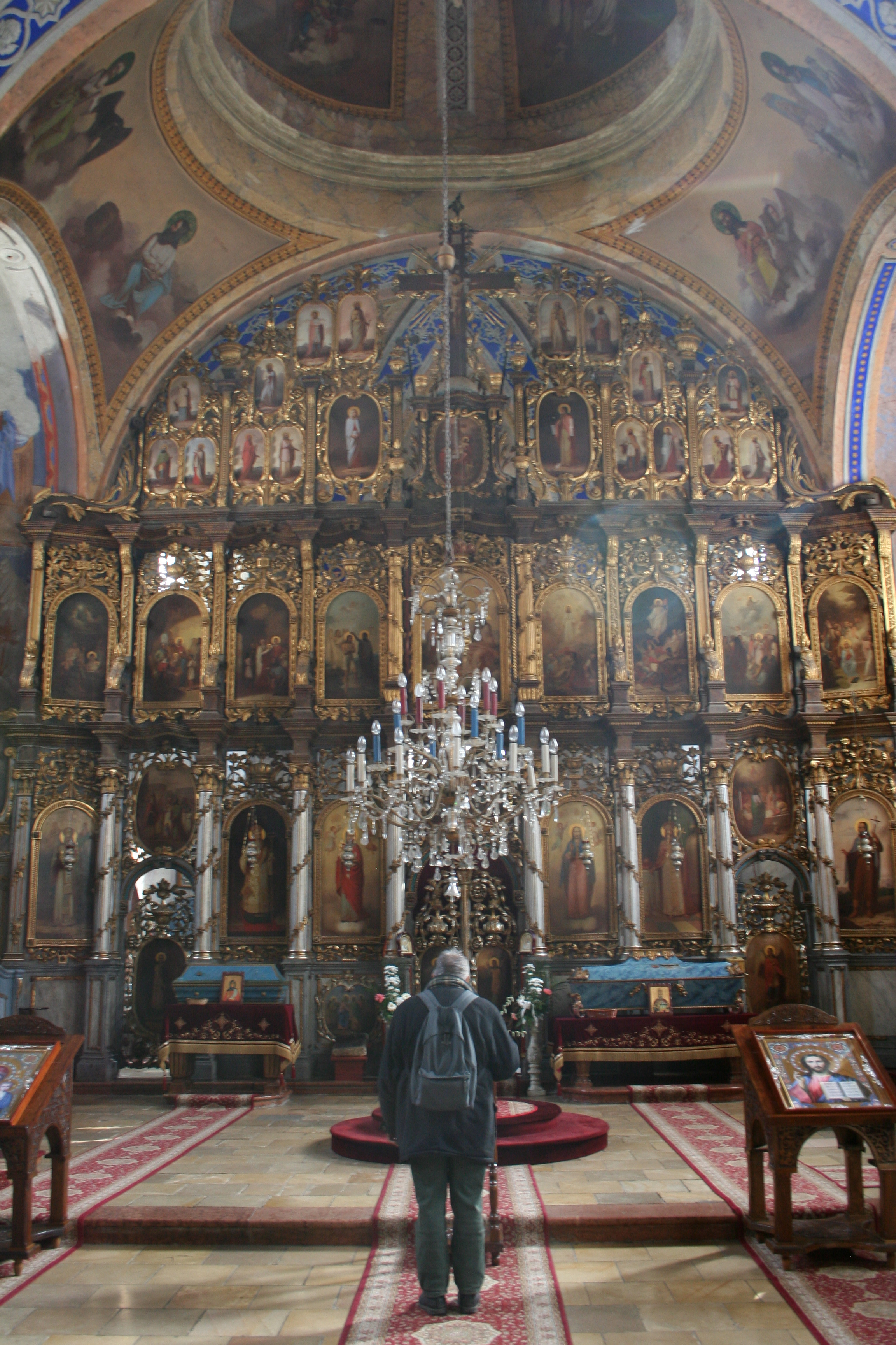 Manastir Vrdnik